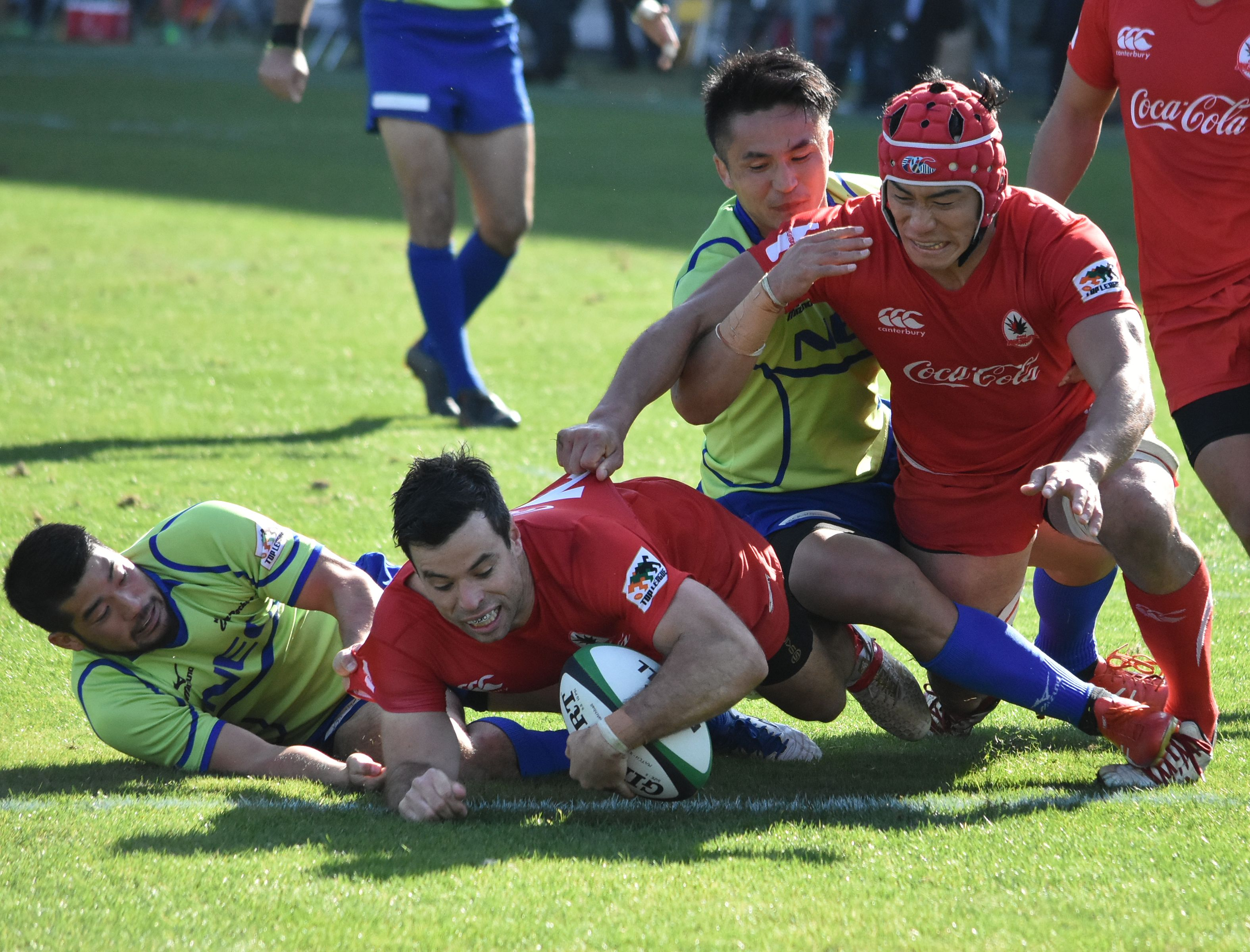 ジェームズ・マーシャル